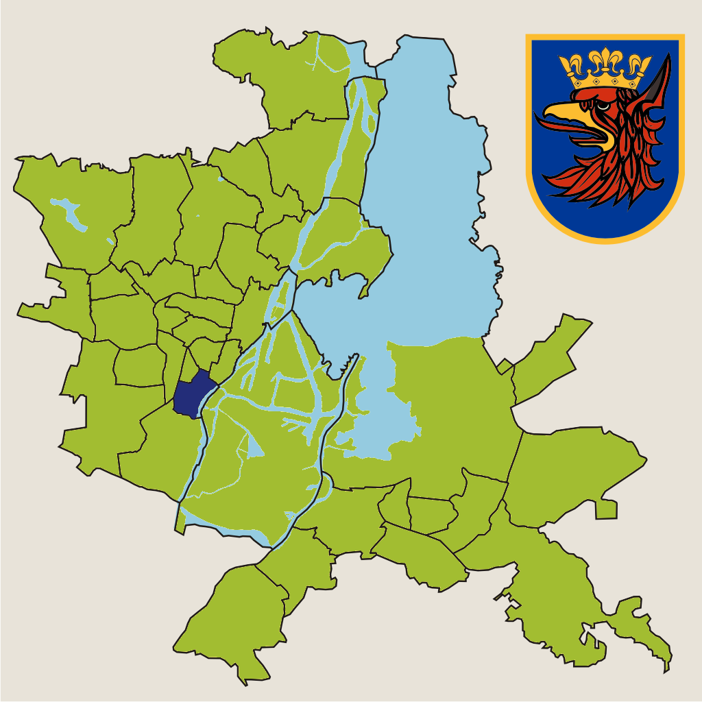 Osiedle "Nowe Miasto" w Szczecinie – jednostka pomocnicza miasta w 2010